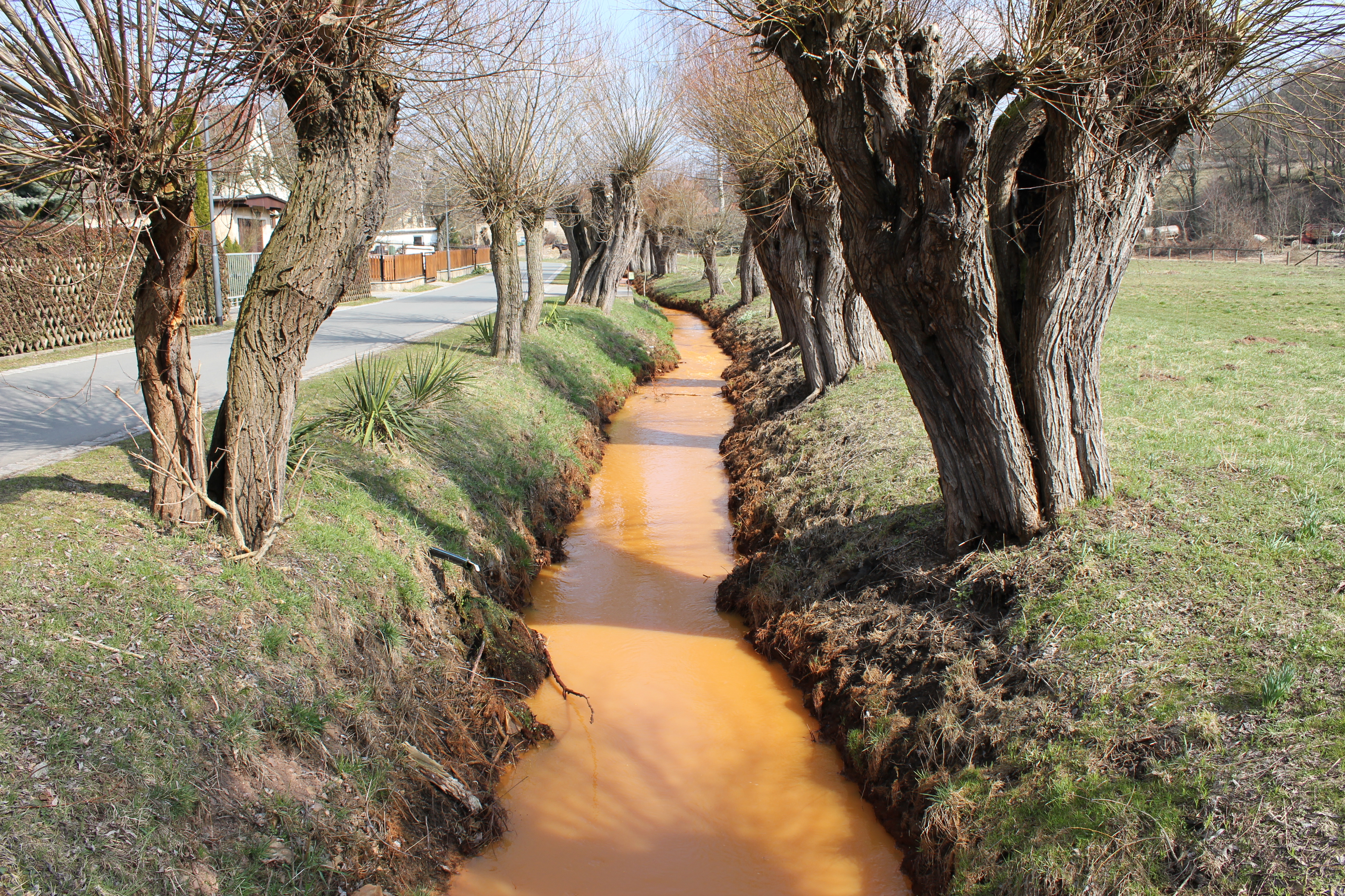 Gessenbach im März 2011. (Rötliche Verfärbung wegen stark erhöten Eisenwerten.)